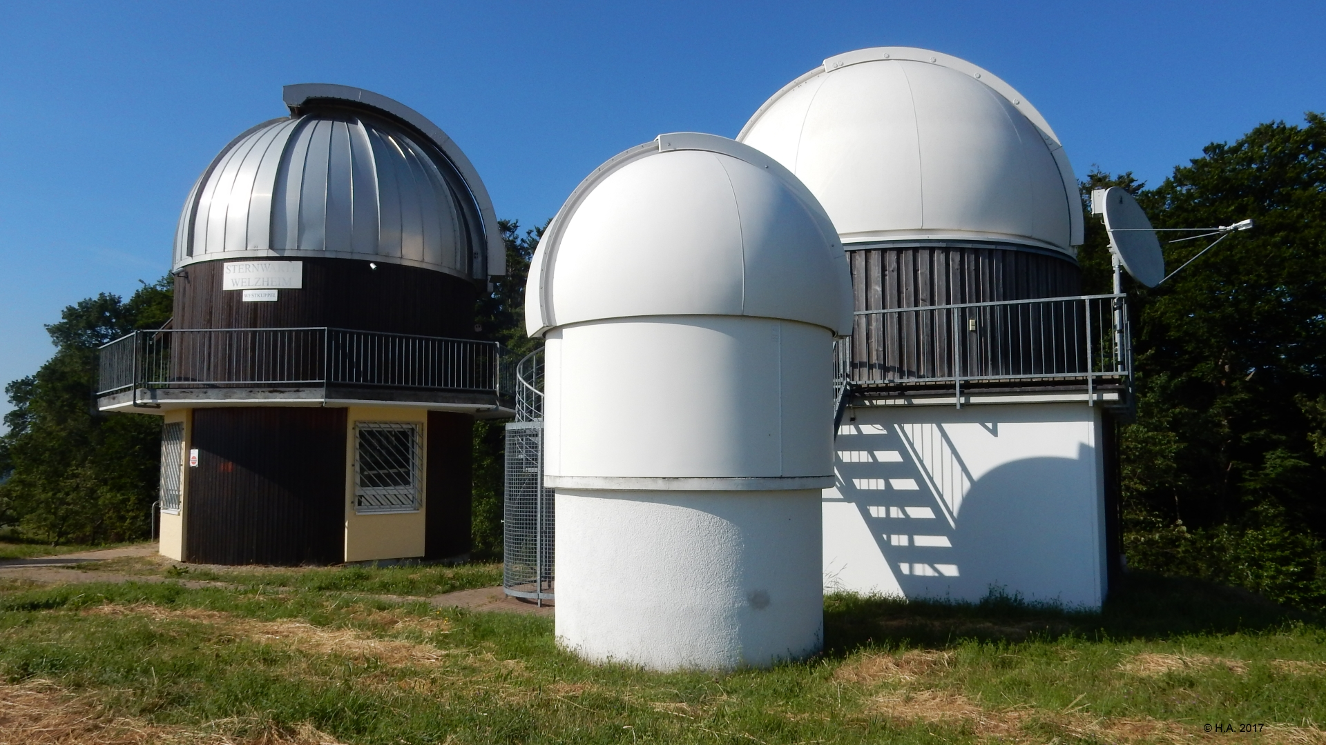 Sternwarte Welzheim, aufgenommen am 24.06.2017